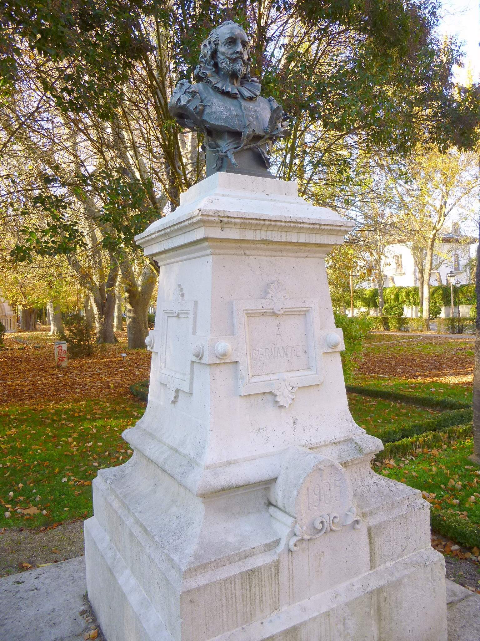 Burgos - Parque de la Isla, monumento a Cervantes